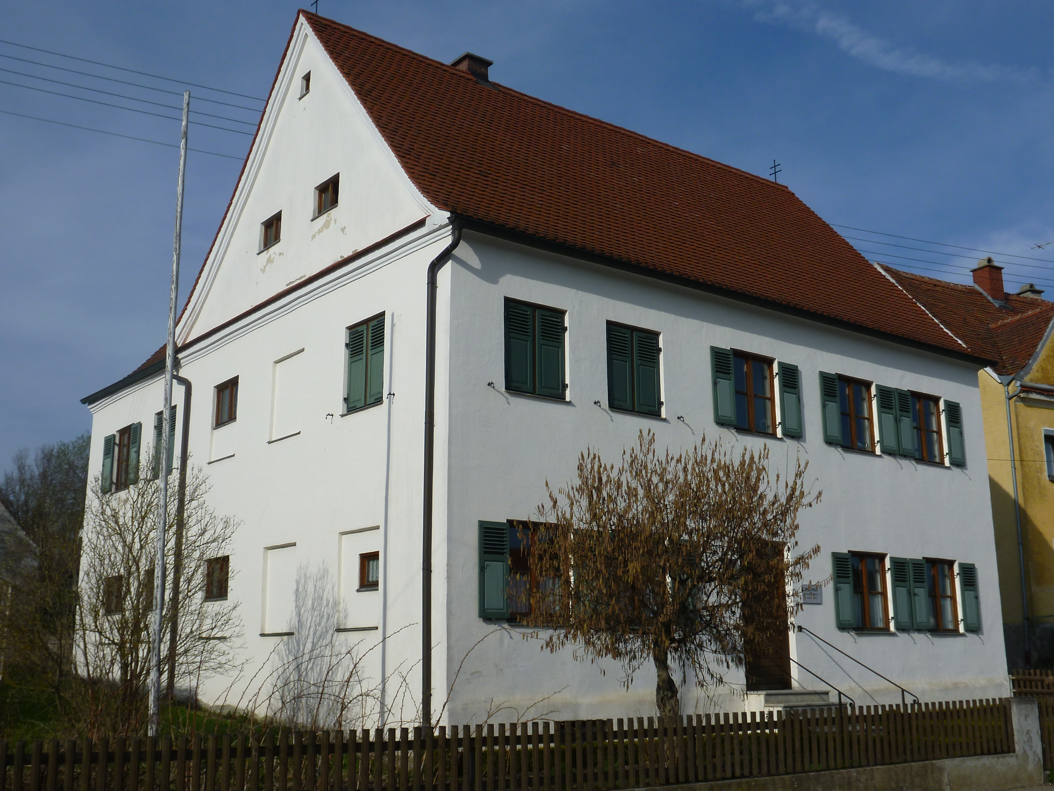 Pfarrhaus, Satteldachbau, 1. Hälfte 18. Jahrhundert, Wertinger Str. 54